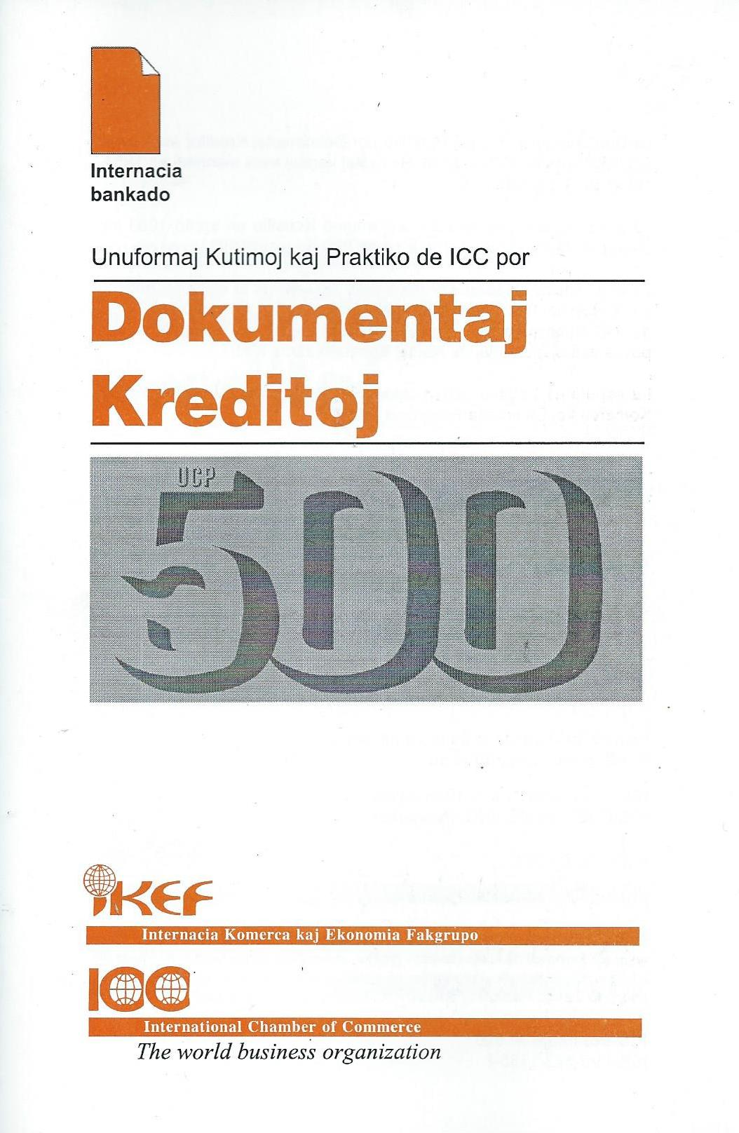 librokovrilo de libro "Dokumentaj Kreditoj", 1993